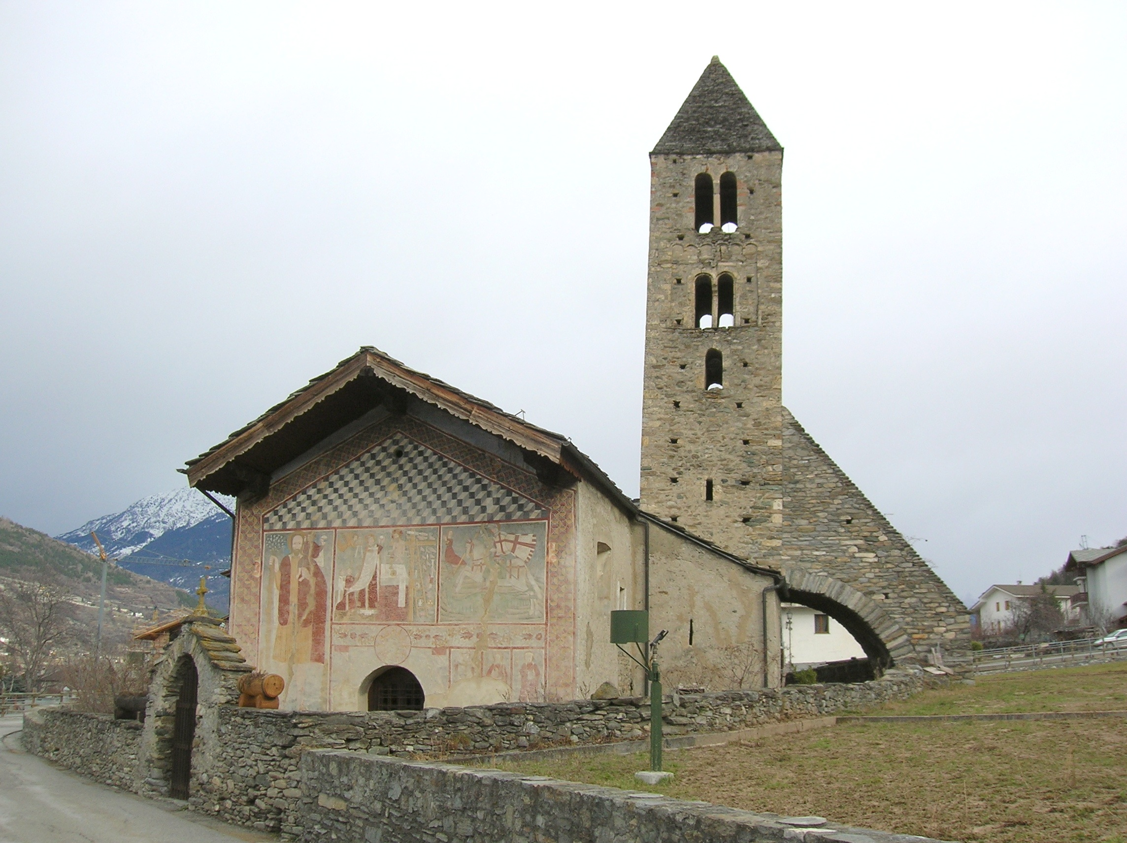 chiesa della Madeleine, Gressan, Valle d'Aosta, Italia. Dedicata a Sainte-Marie-Magdeleine de Villa.